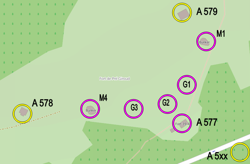 Artilleriewerk Pré-Giroud, Vallorbe VD, Schweiz